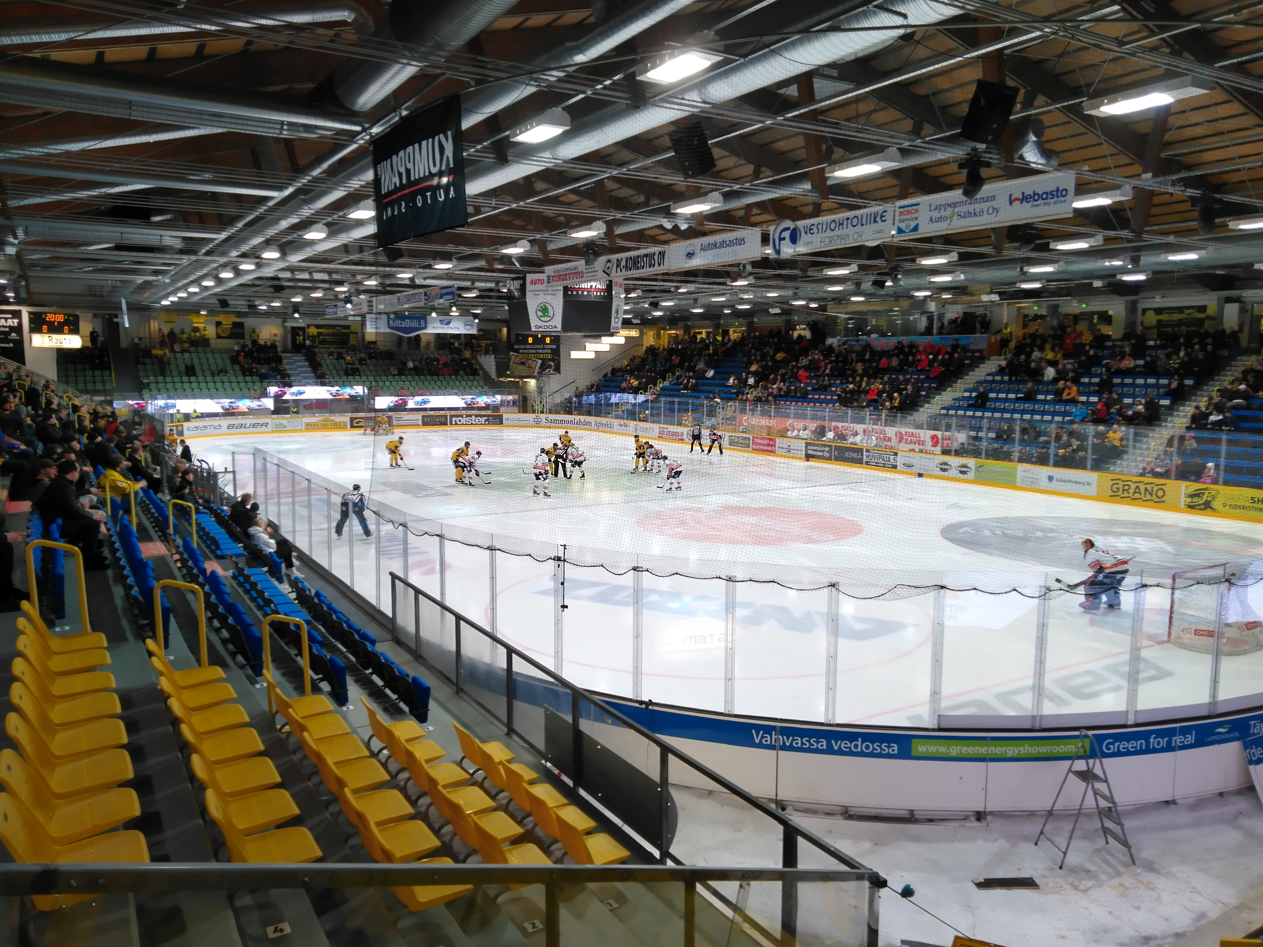 SaiPa-HPK ottelu 4.3.2020.